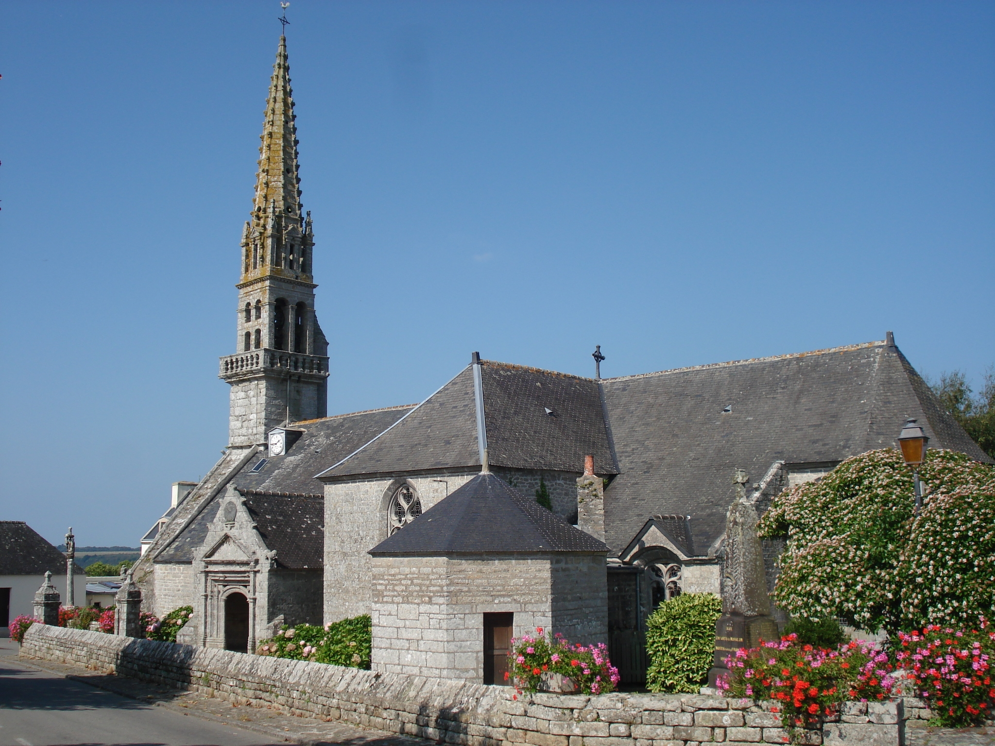 L’ancienne église de Mahalon appartenait à l’époque romane. Cette église fut en partie rebâtie en 1772 mais elle a conservé de nombreux éléments architecturaux mi-partie renaissance et gothique de sa construction originelle. A l’intérieur, les colonnes de l’école de Pont-Croix sont tout à fait remarquables et remontent au XIIème siècle. L’église Saint-Magloire abrite un des premiers monuments funéraires de la Renaissance en Bretagne. Encastré dans le mur collatéral nord, un « enfeu » (niche) accueille le monument du XVIème siècle. Cet enfeu fut muré, sans doute pendant la Révolution et a été retrouvé tout à fait par hasard lors de travaux de restauration de l’église en 1911.